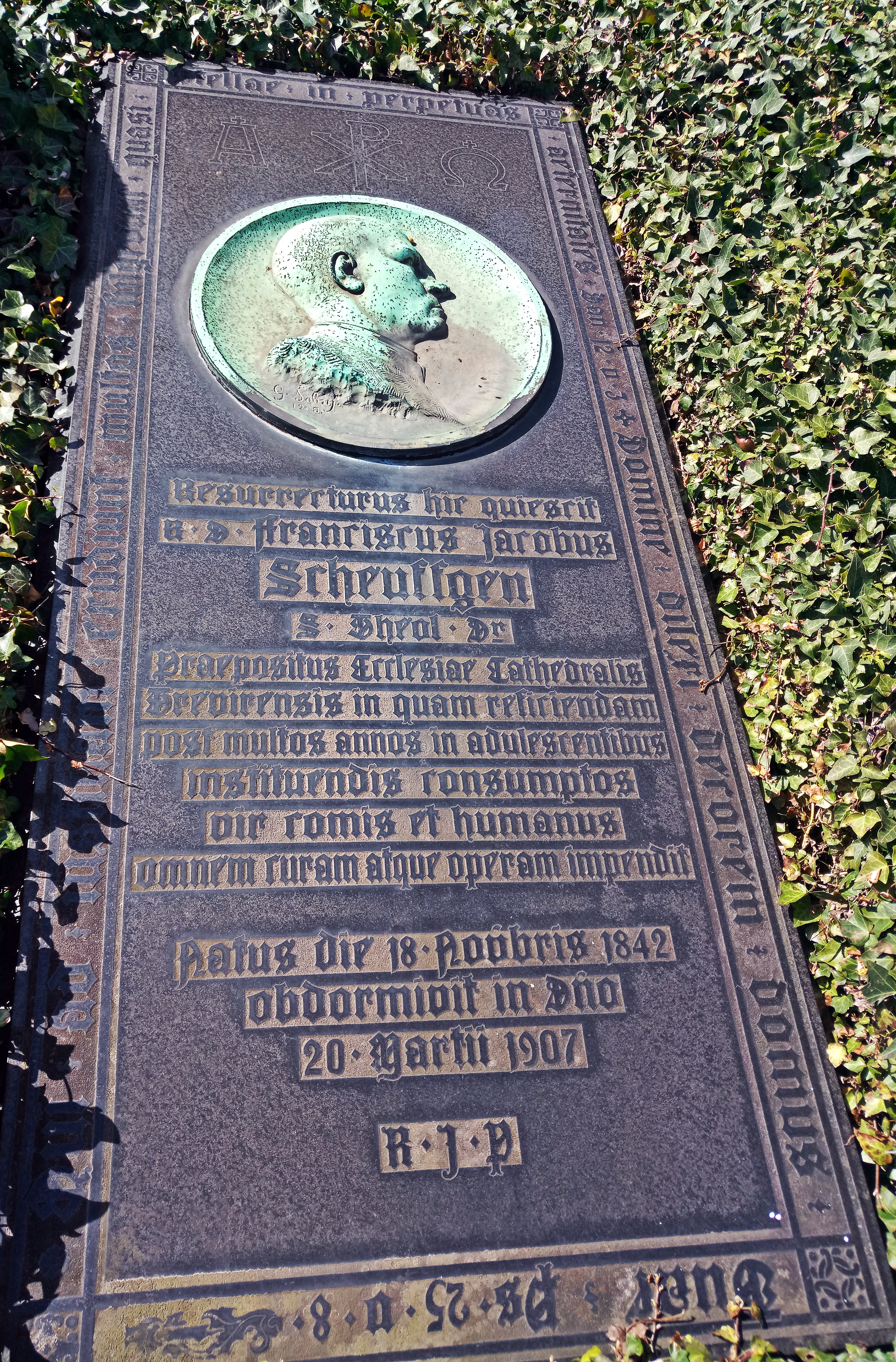 Grabplatte Dompropst Franz Jakob Scheuffgen (1842-1907)